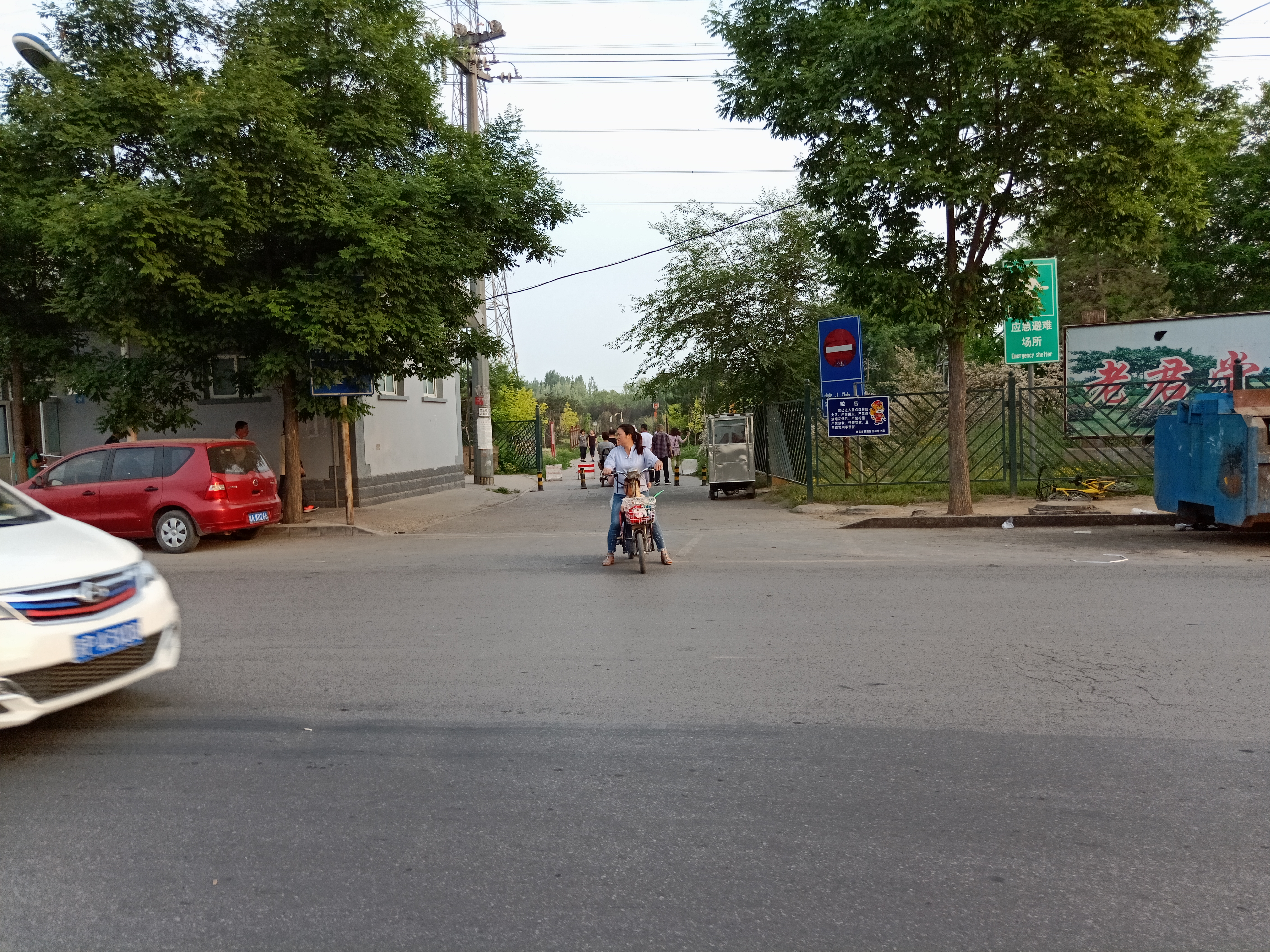 粵語: 老君堂公园